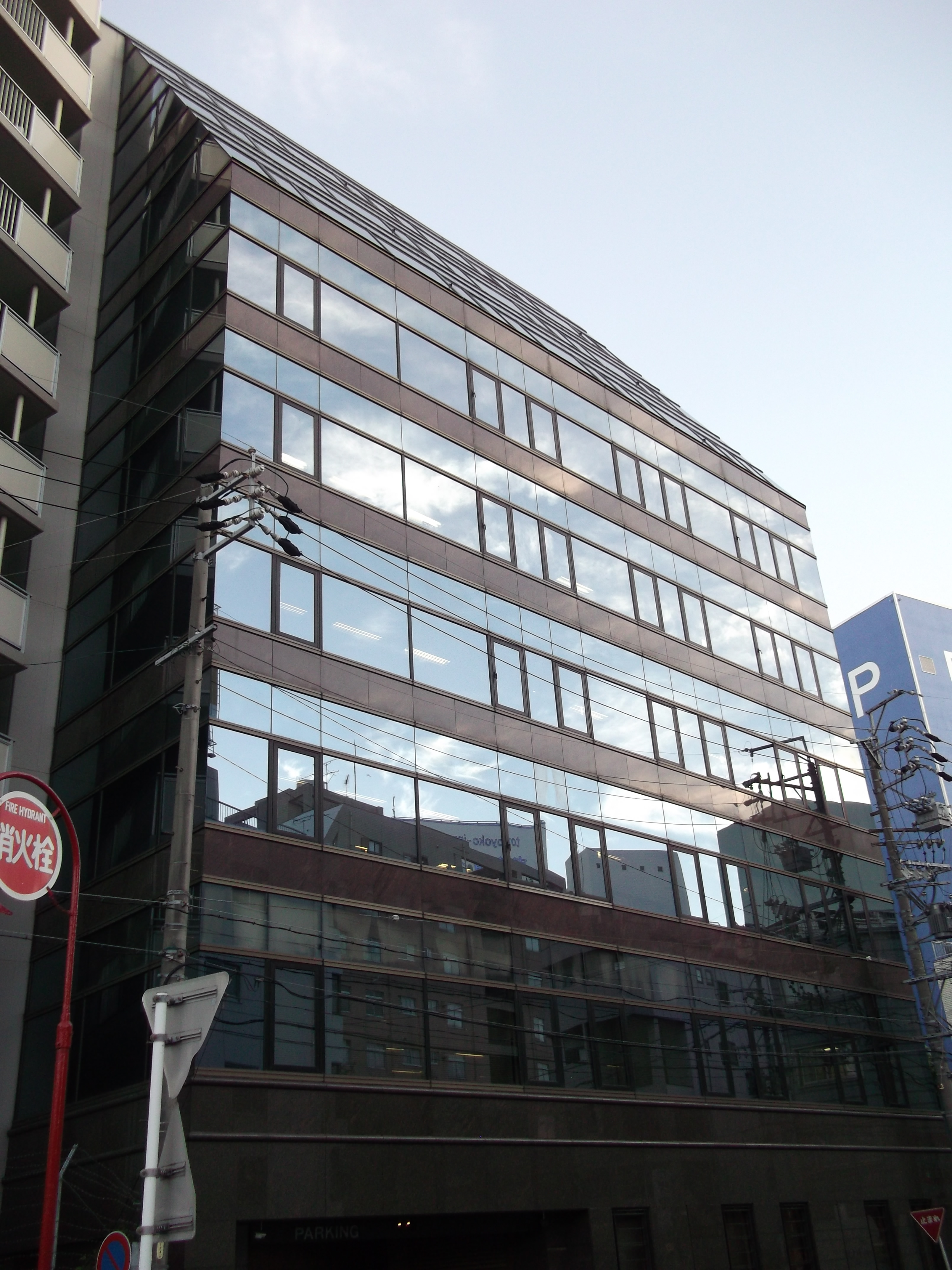 名古屋市東区東桜のリゾートトラスト本社を西側公道北側より撮影